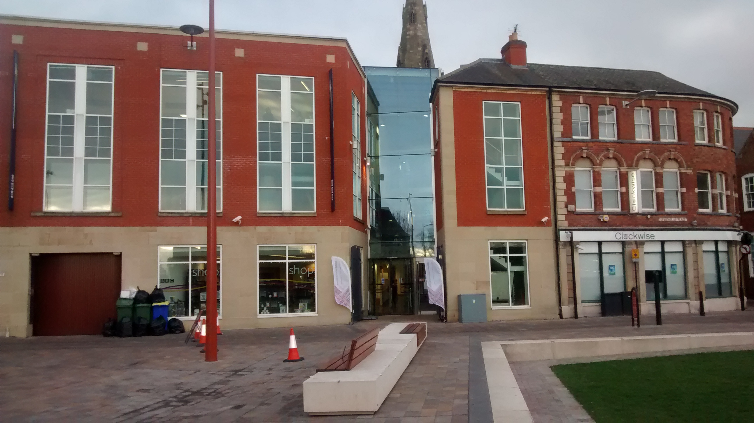 Siedziba Radia BBC Leicester